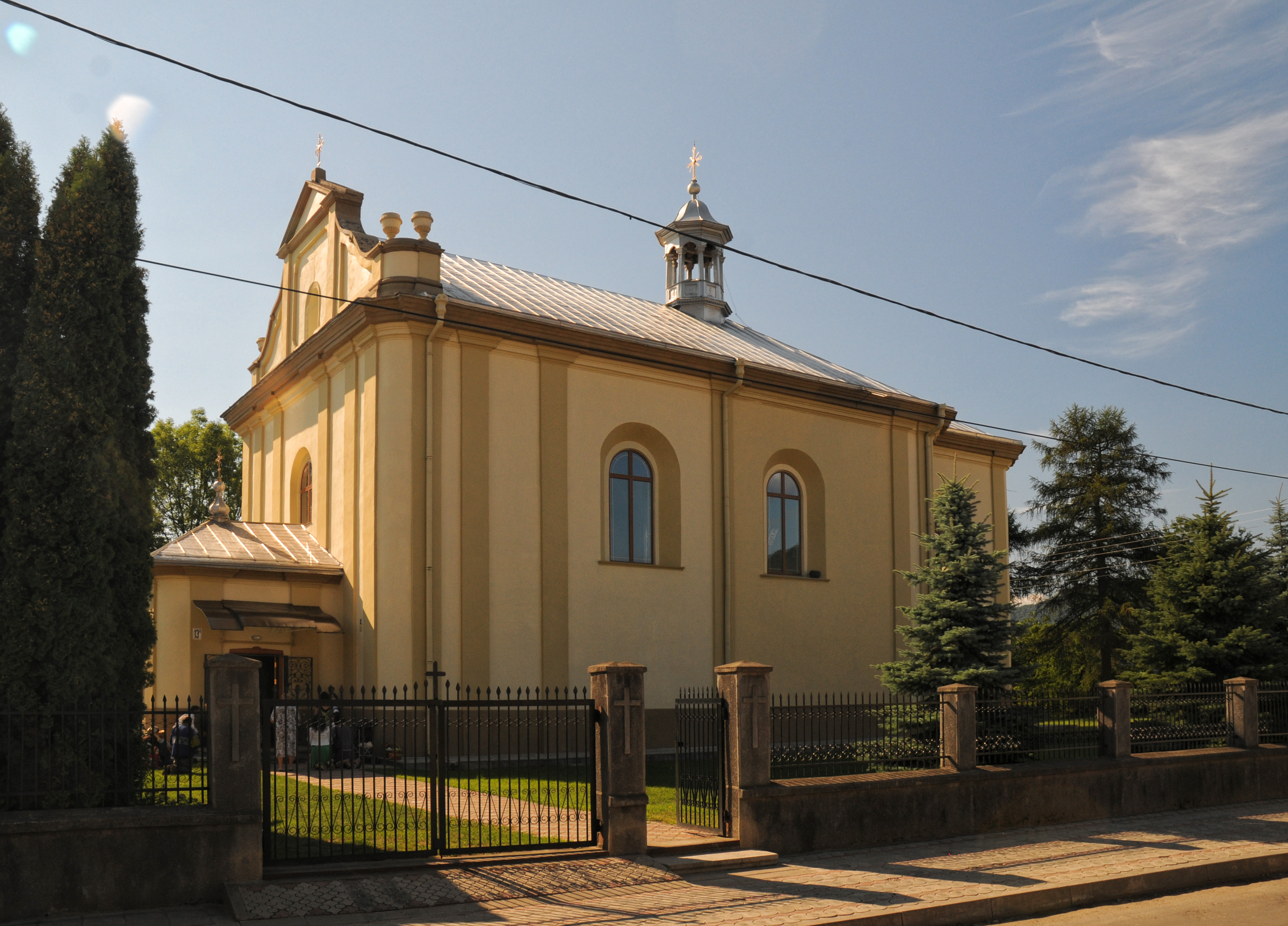 Кути, костел вірменський